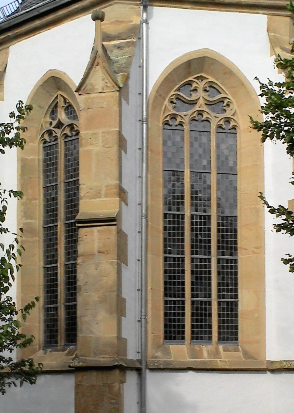 masswerkfenster chor